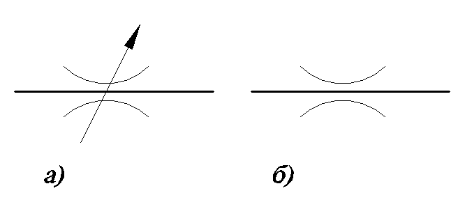 Условные графические обозначения гидродросселей